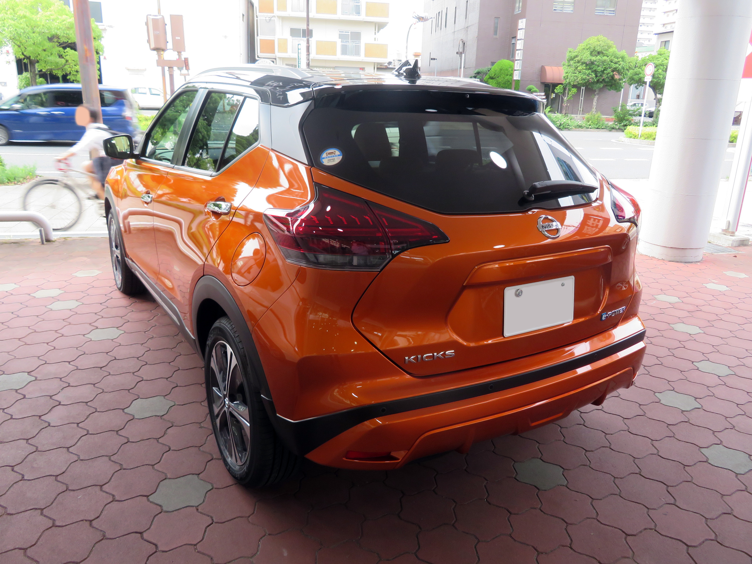 6AA-P15型日産・キックスXツートーンインテリアエディションをリアから撮影。